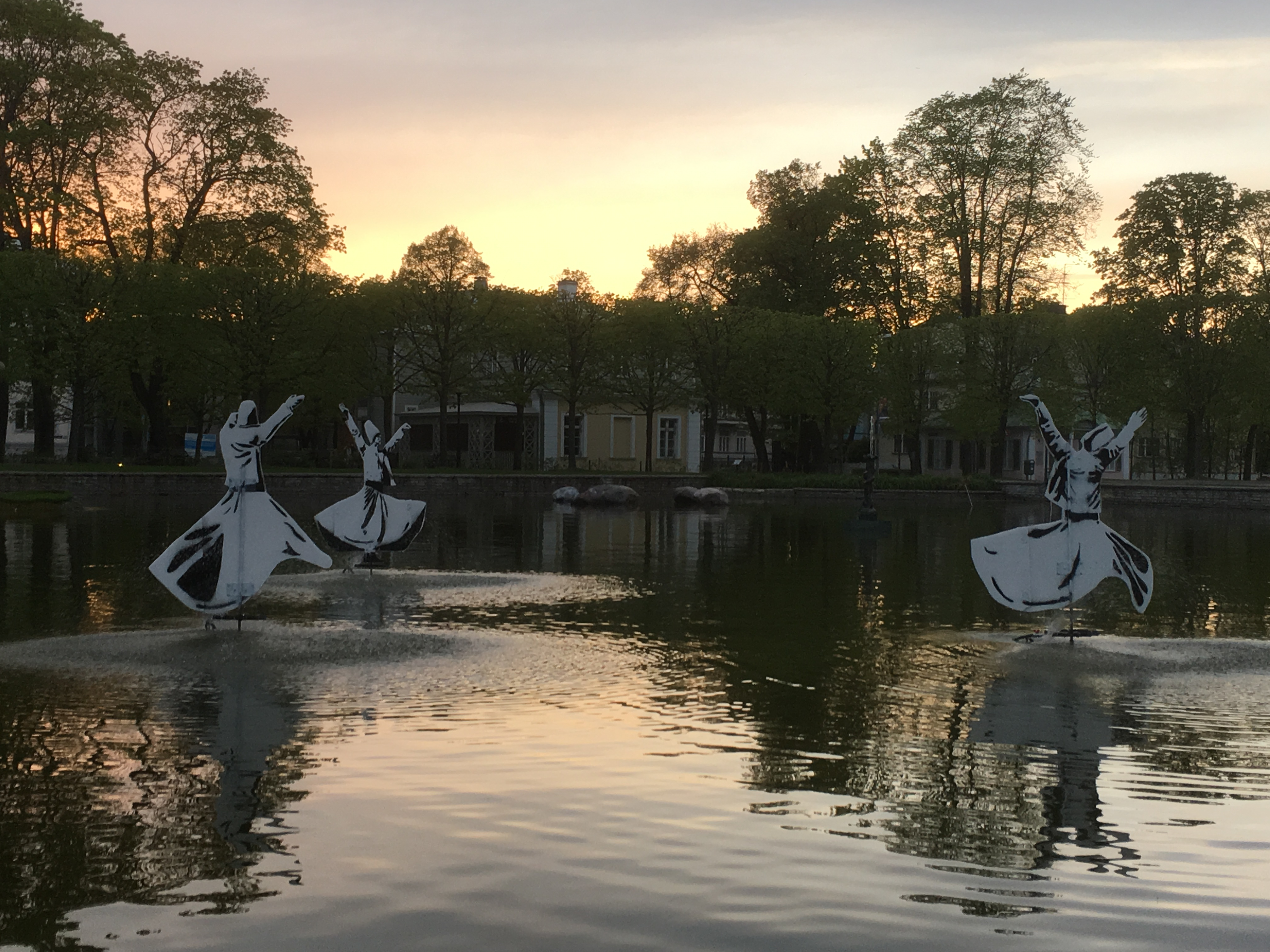 Elo Liivi installatsioon "Miraaž ehk kolme müstiku transformatsioon" Kadrioru tiigil, 2016